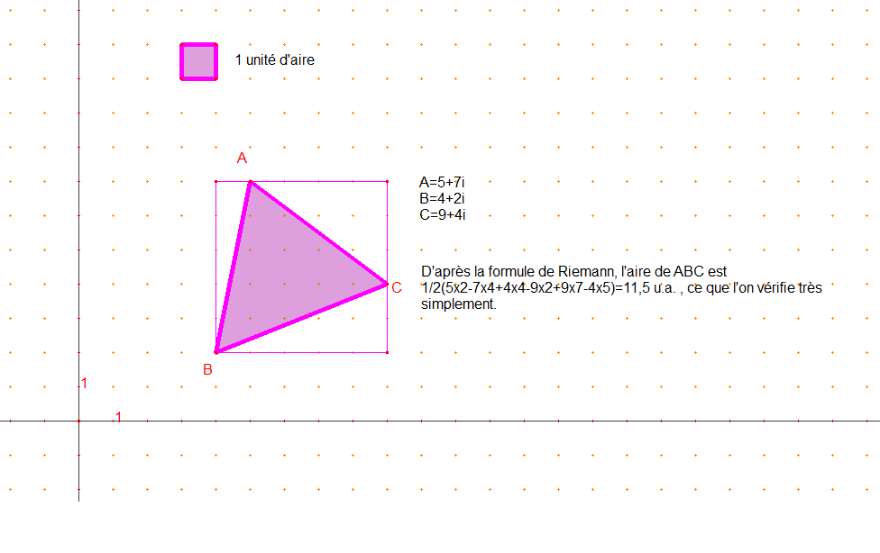 créé sous cabrigéomètre